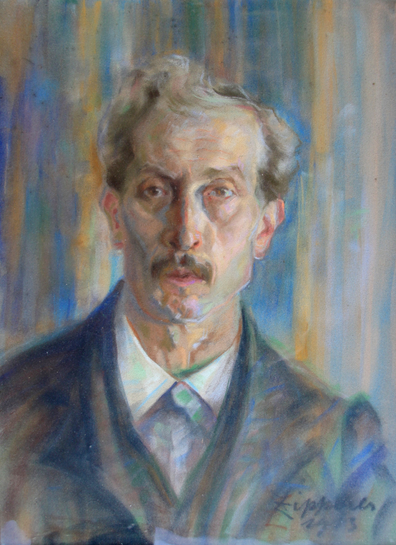 Ernst Hermann Zipperer (Vater des Künstlers), Pastellkreidezeichnung